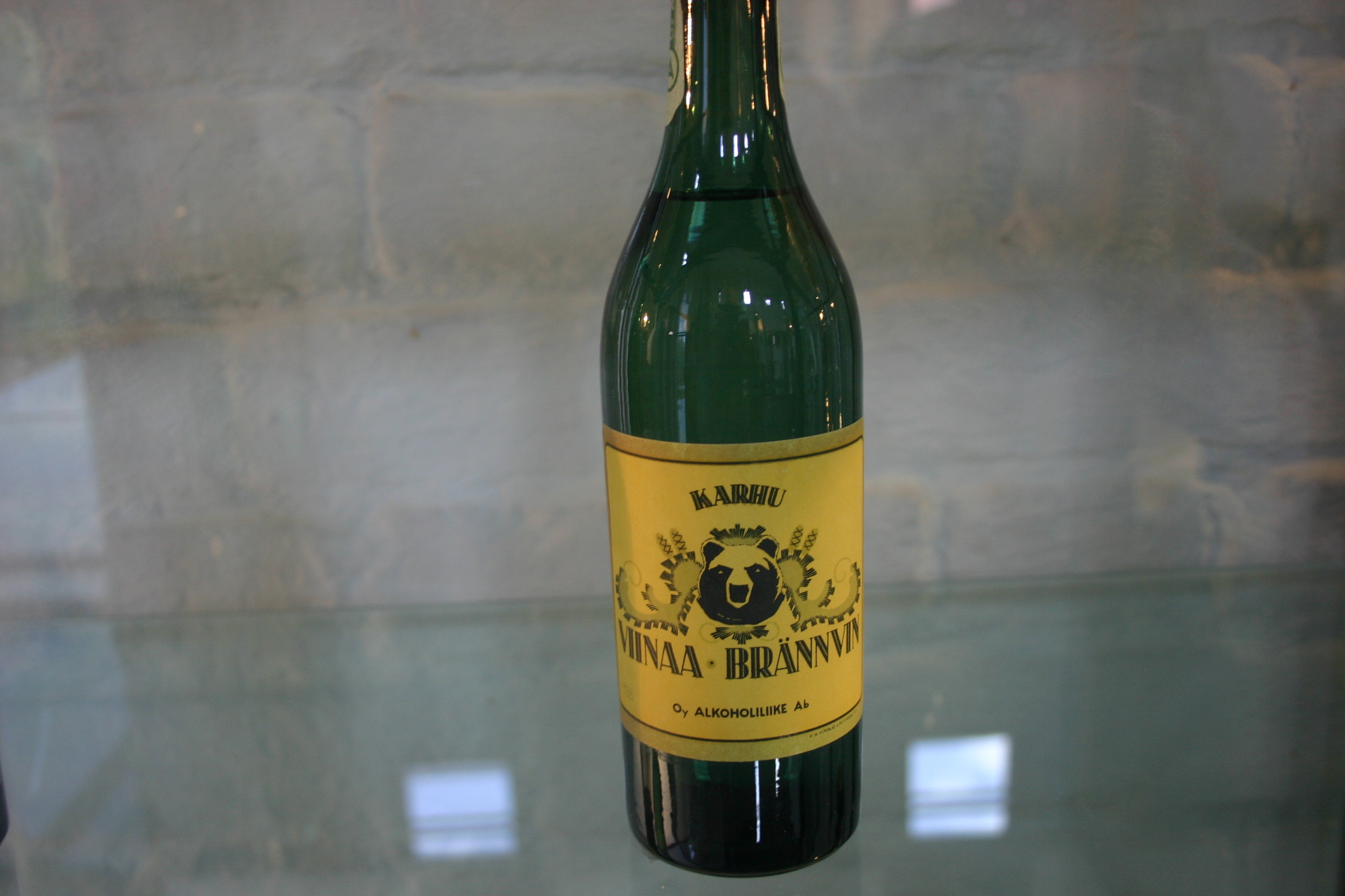 Alkuperäinen Karhuviinapullo